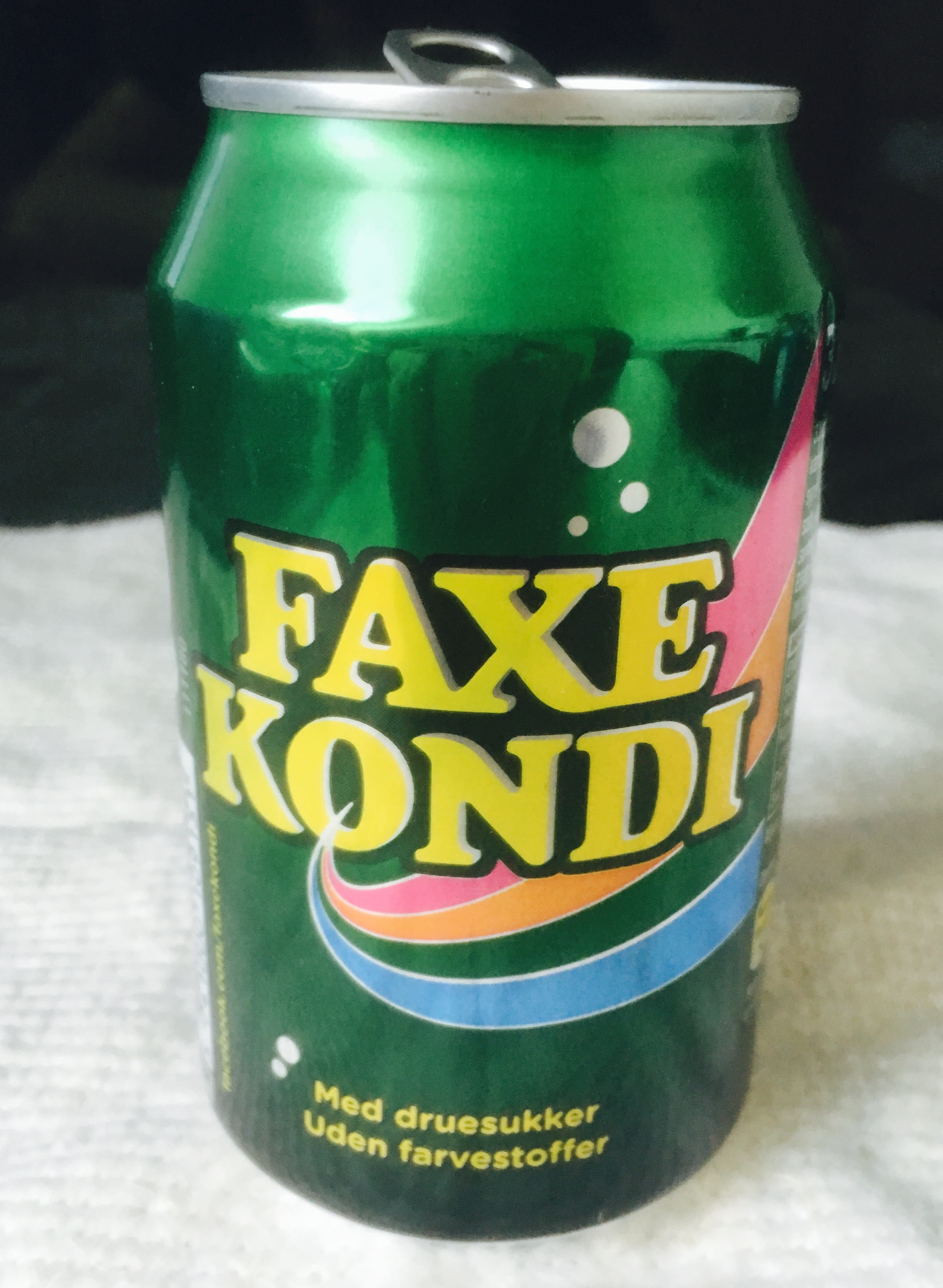 Faxe Kondi dåse